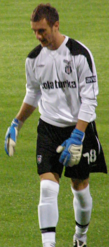 2008-2009 Beşiktaş - Hacettepe maçında